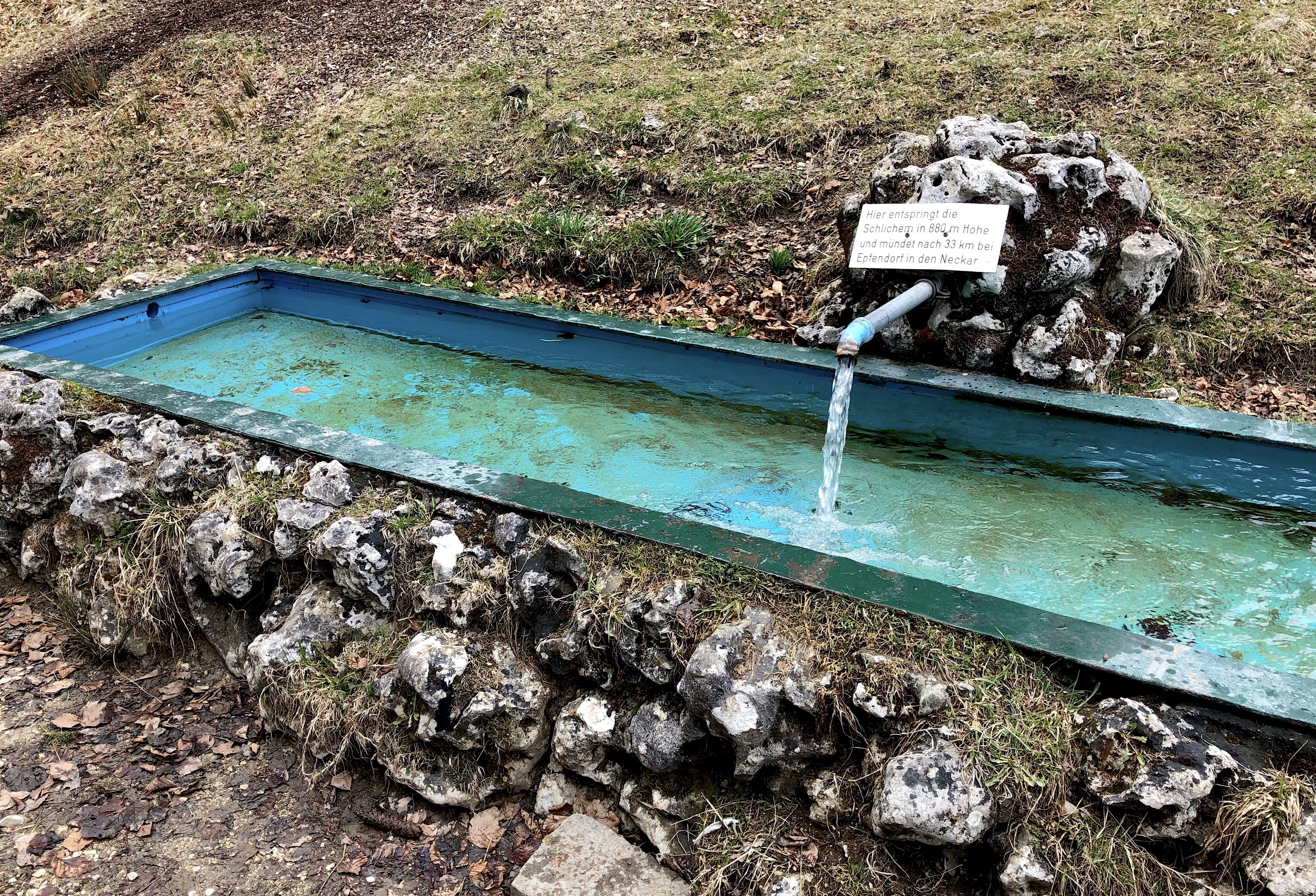 Ursprung der Schlichem, Quelle bei Tieringen